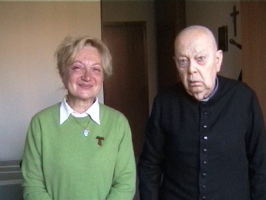 Sorella Angela Musolesi e Don Gabriele Amorth